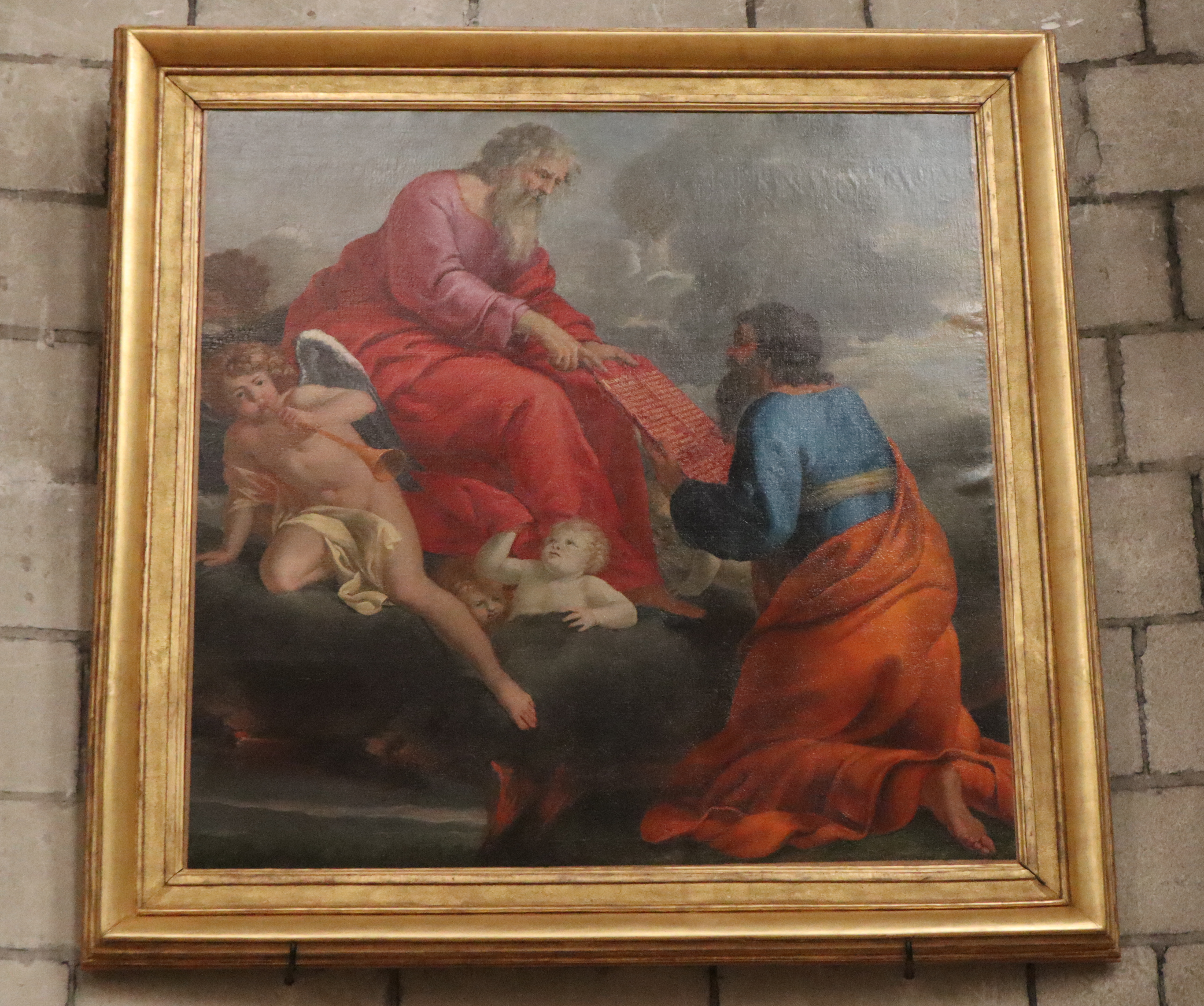 Tableau attribué à Nicolas Prévost et accroché dans l'abside de l'église Saint-Joseph d'Angers (49). Moïse recevant les Tables de la Loi.